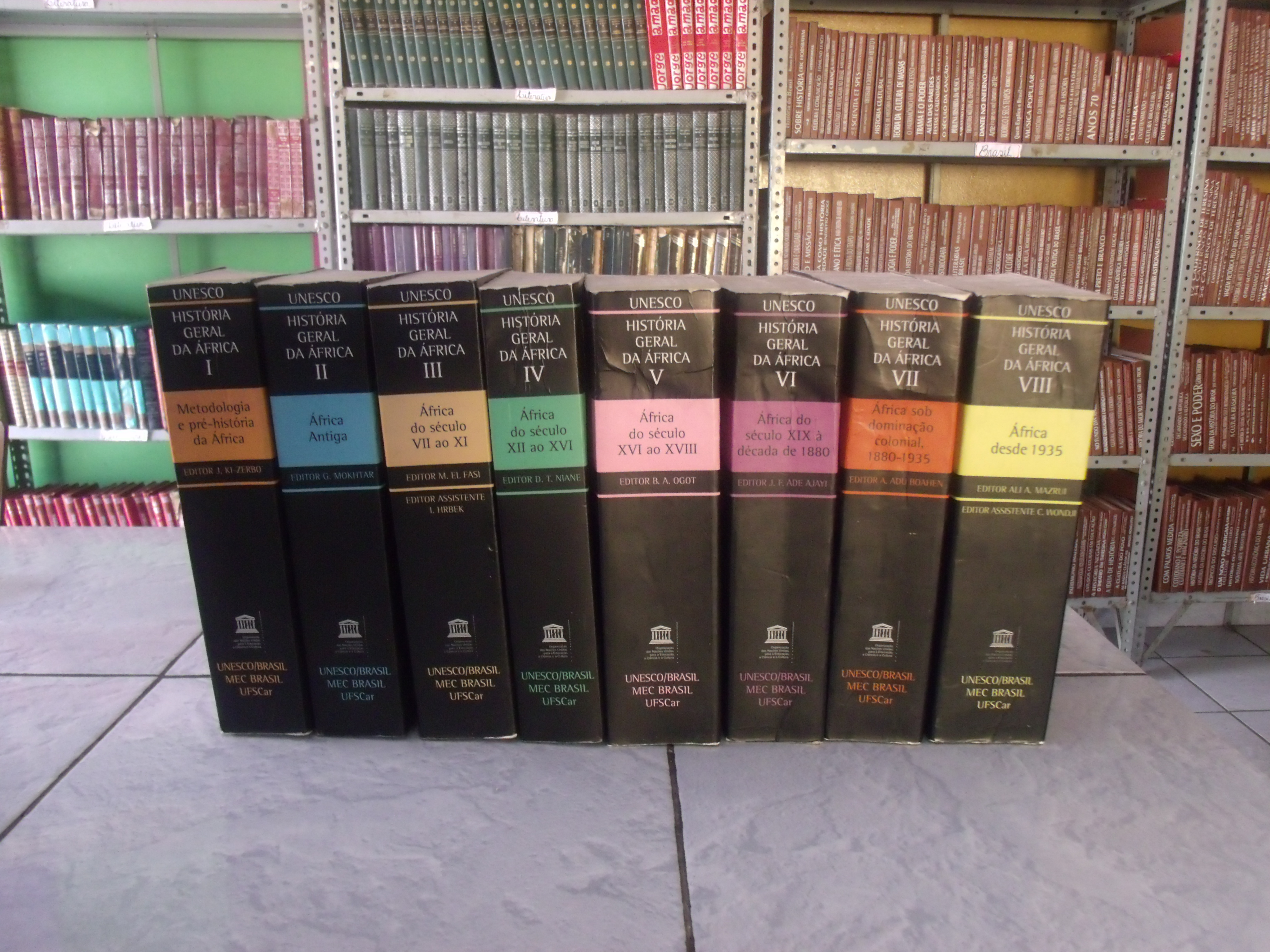 Edição brasileira da Coleção História Geral da África numa biblioteca pública.